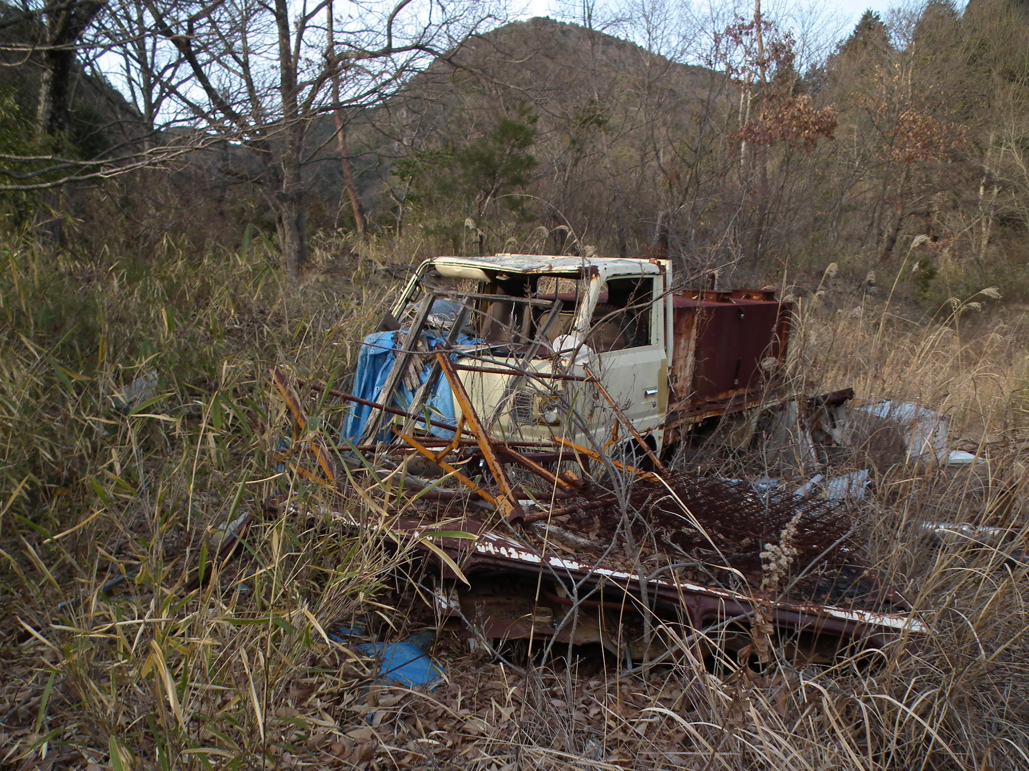 Mt,Tanjo Yamada-cho Kobe 丹生山と廃車